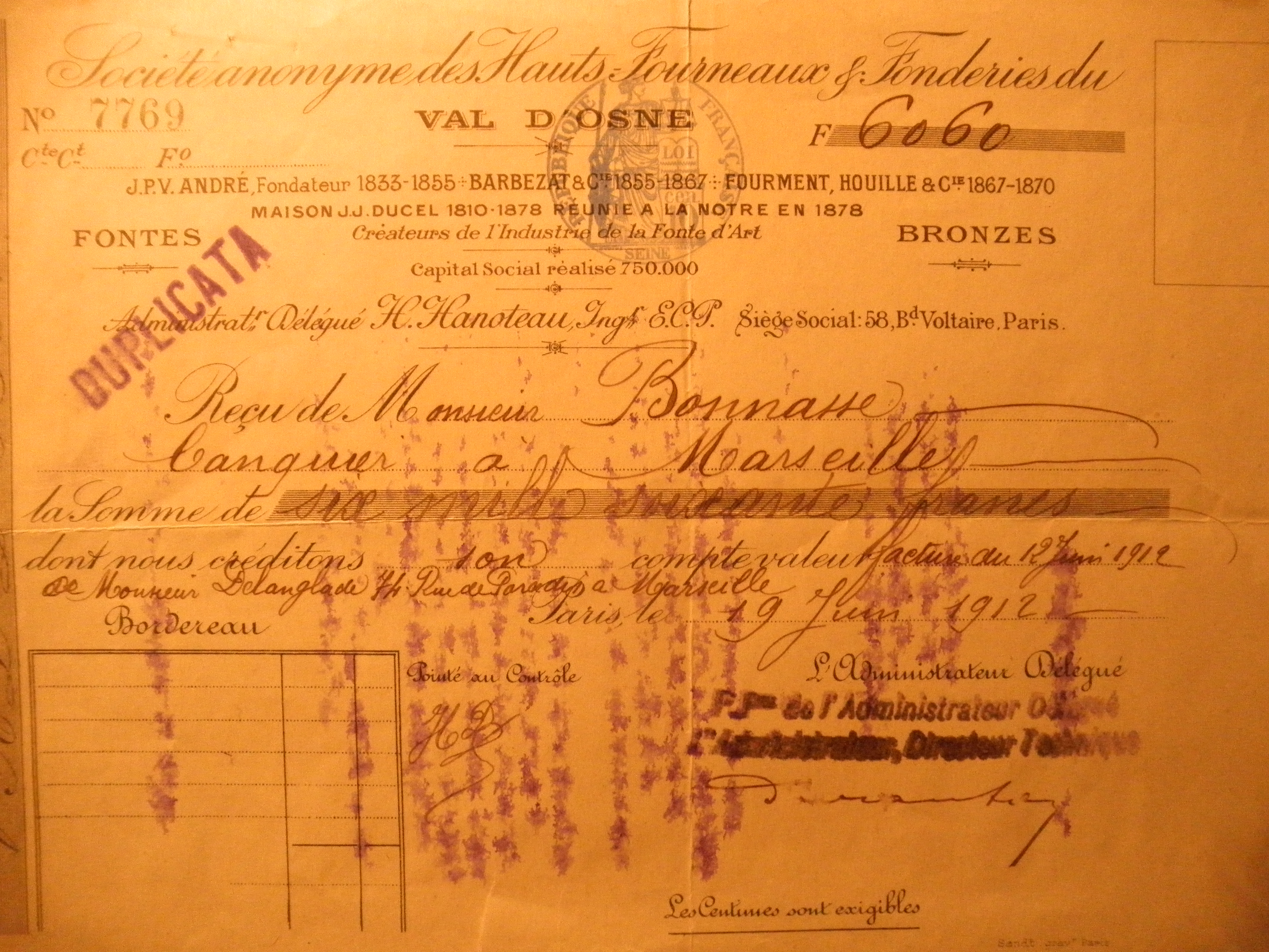 1910 contrat Bonnasse Val d'Osne